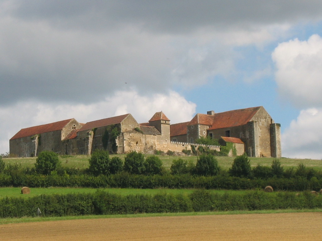 vue du château de Pisy, Yonne